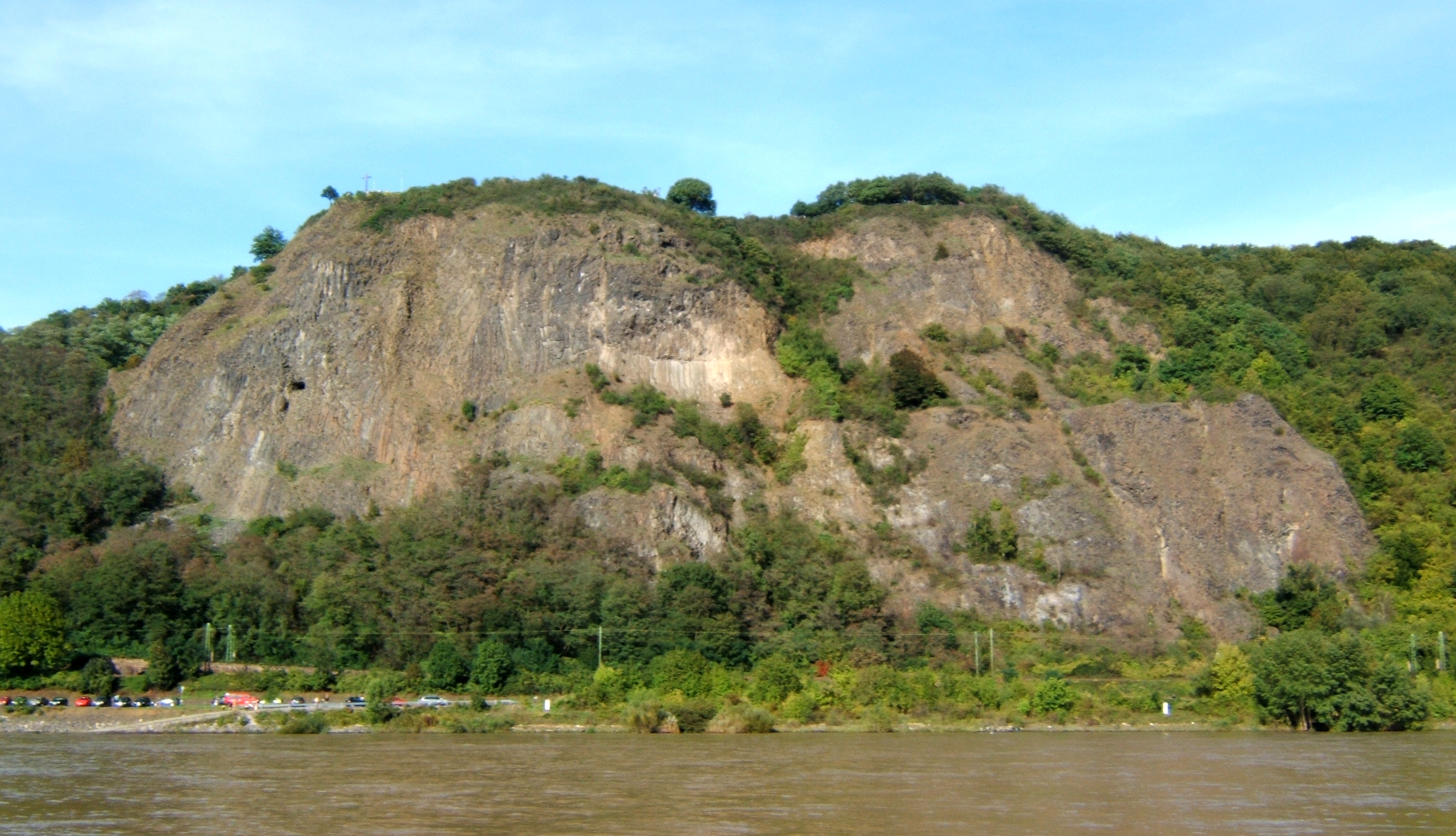 Basaltstrukturen der Erpeler Ley (Naturschutzgebiet „Erpeler Ley“) in Erpel